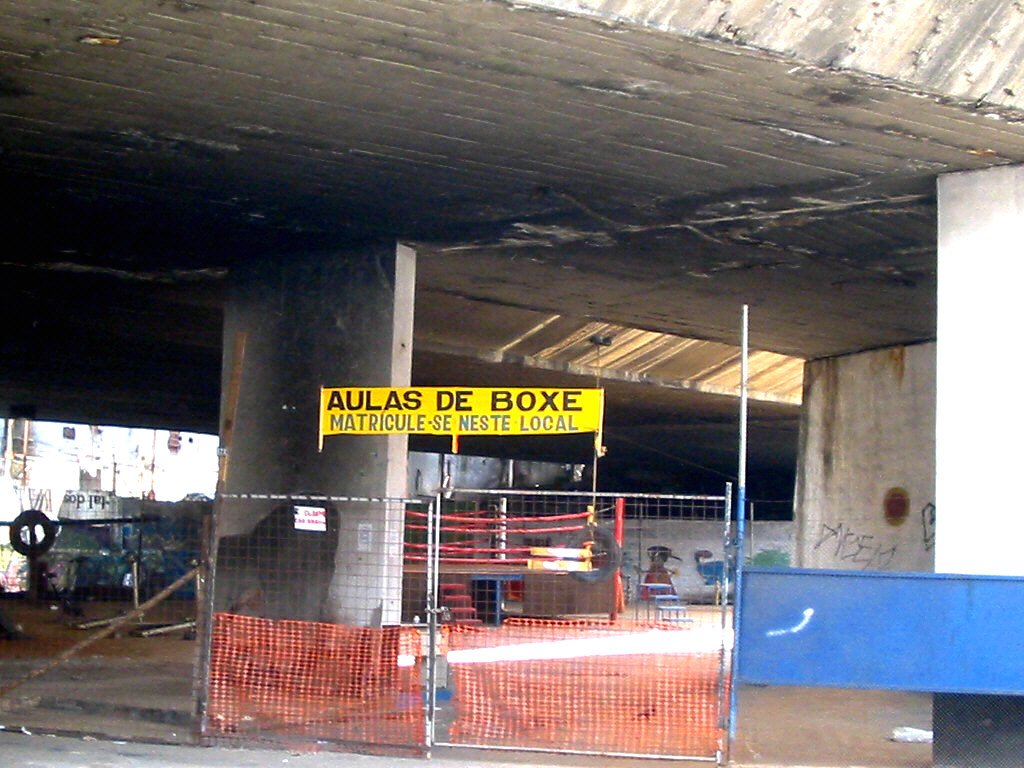 Academia de Nilson Garrido, sob o Viaduto do Café, Bairro da Bela Vista, São Paulo, SP, Brasil